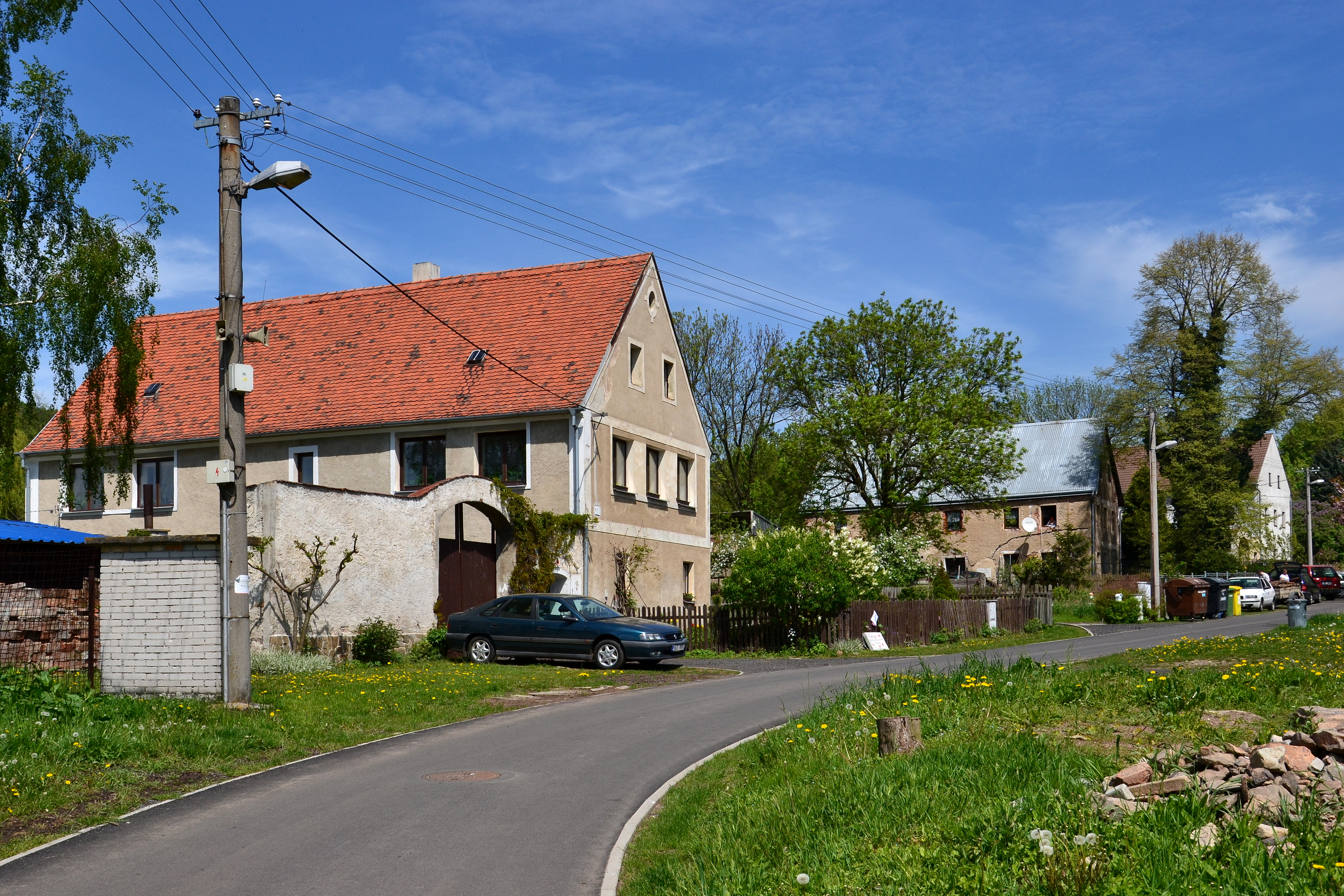 Ciboušov - usedlosti v severní části vesnice